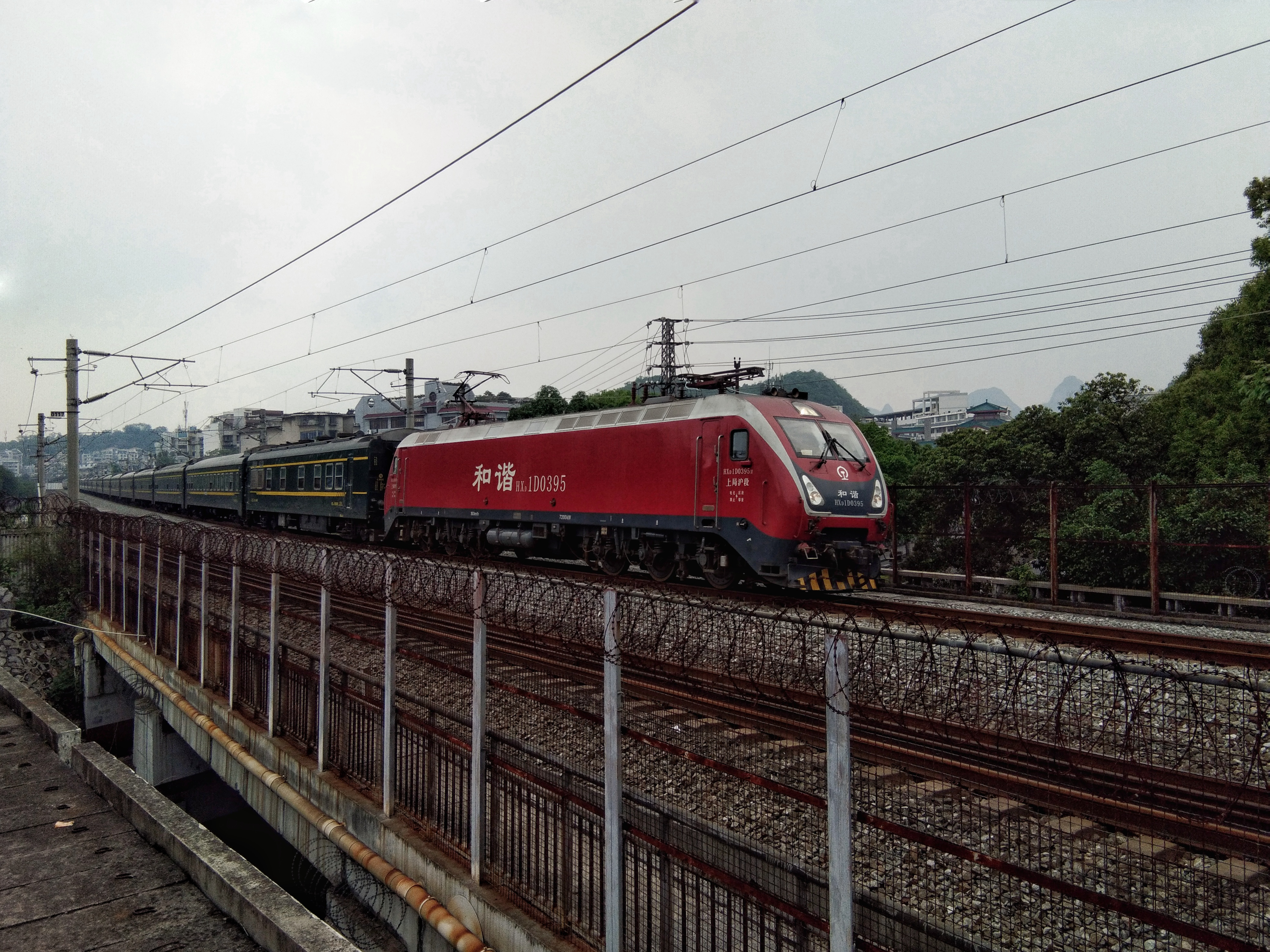 中文（中国大陆）: T382次列车通过丽君路铁路桥